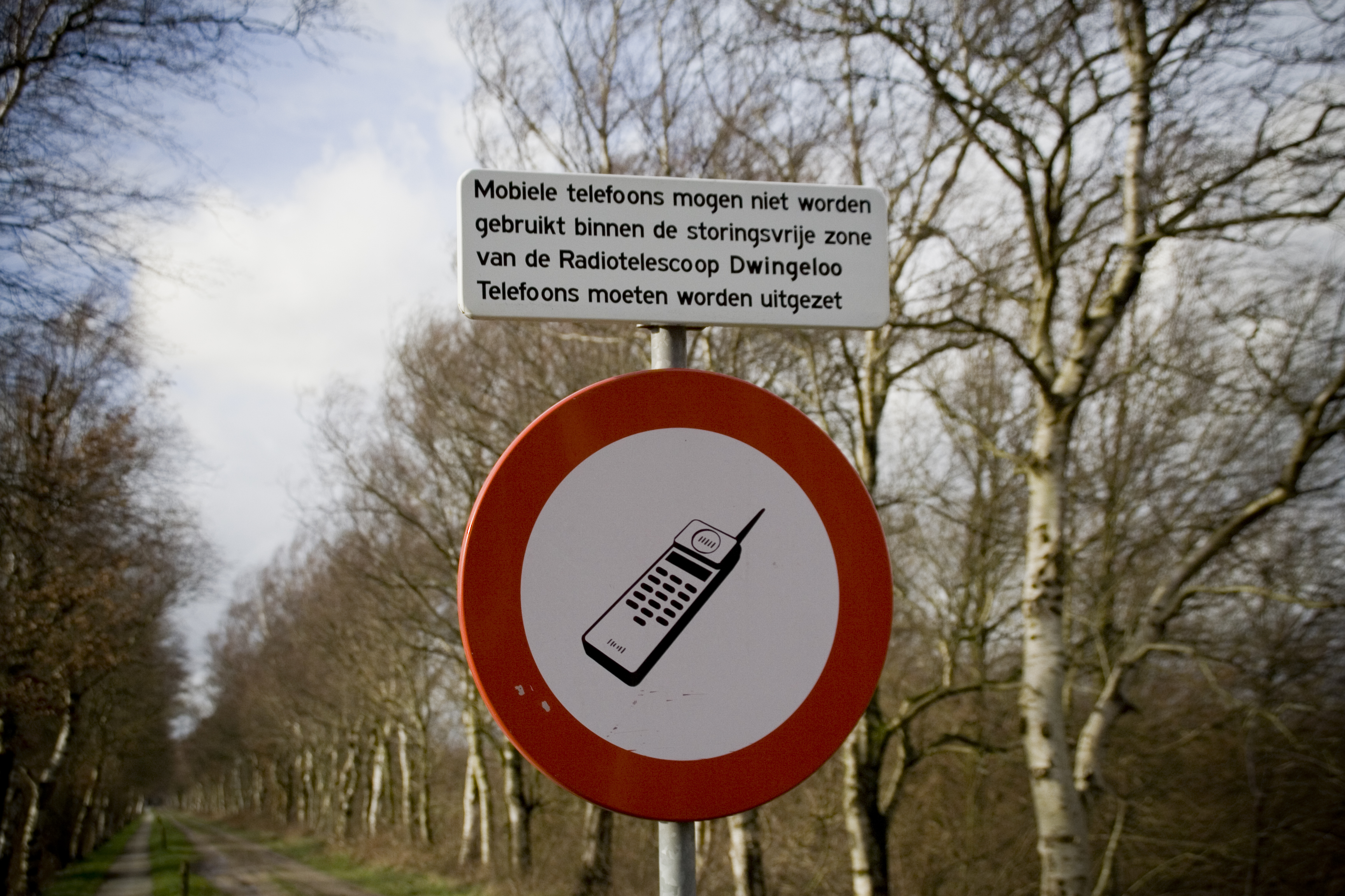 Verbod mobiele telefoons Astron. Eigen werk, GFDL.